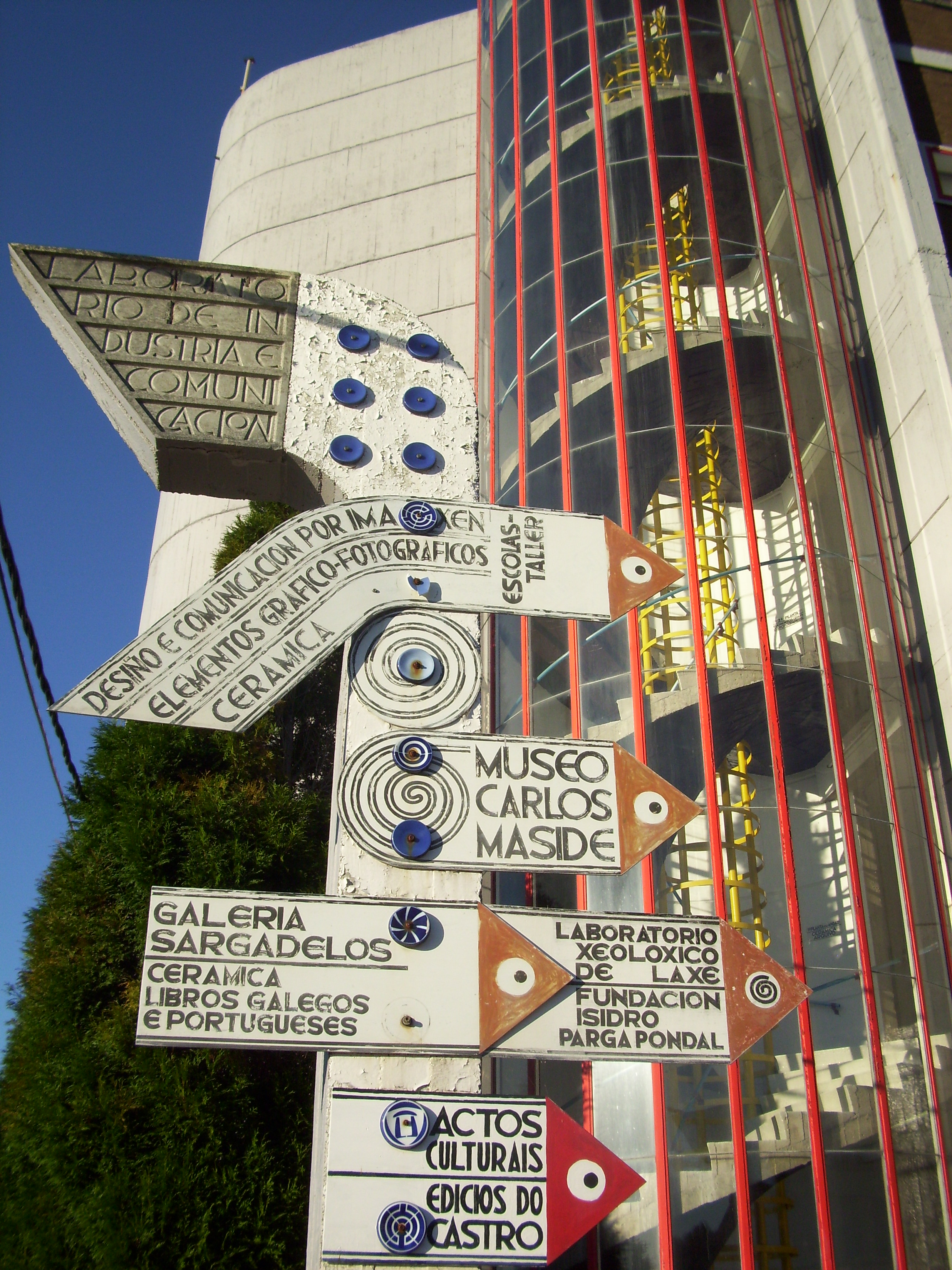 Indicador no complexo de Cerámicas do Castro, unha das dúas fábricas do Grupo Sargadelos, que está situada no Castro de Samoedo (Sada, A Coruña). Aparecen indicacións relativas a Ediciós do Castro, o Laboratorio Xeolóxico de Laxe, a Fundación Isidro Parga Pondal, a Galería Sargadelos ou o Museo Galego de Arte Contemporánea Carlos Maside.